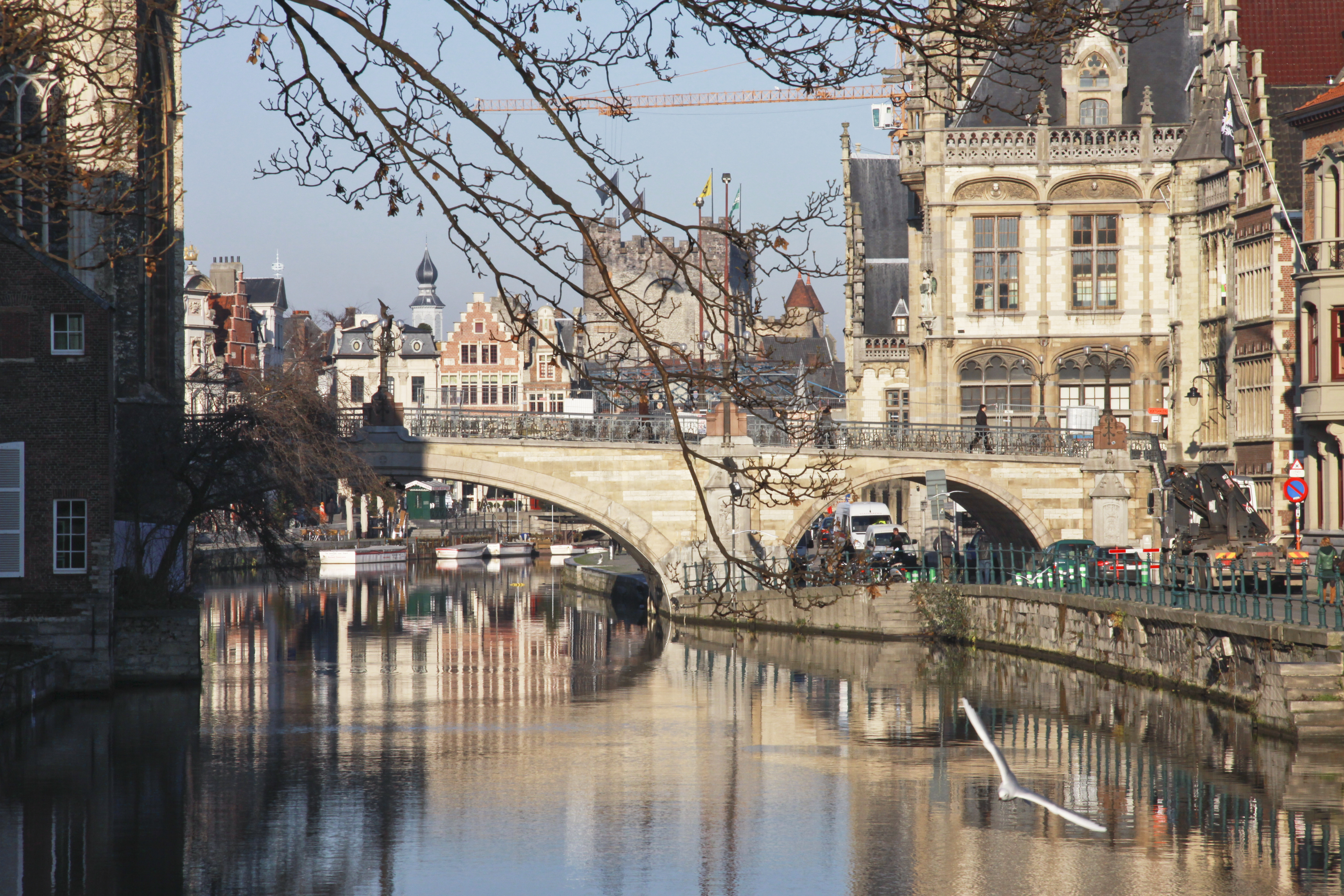 St.Michielsbrug.